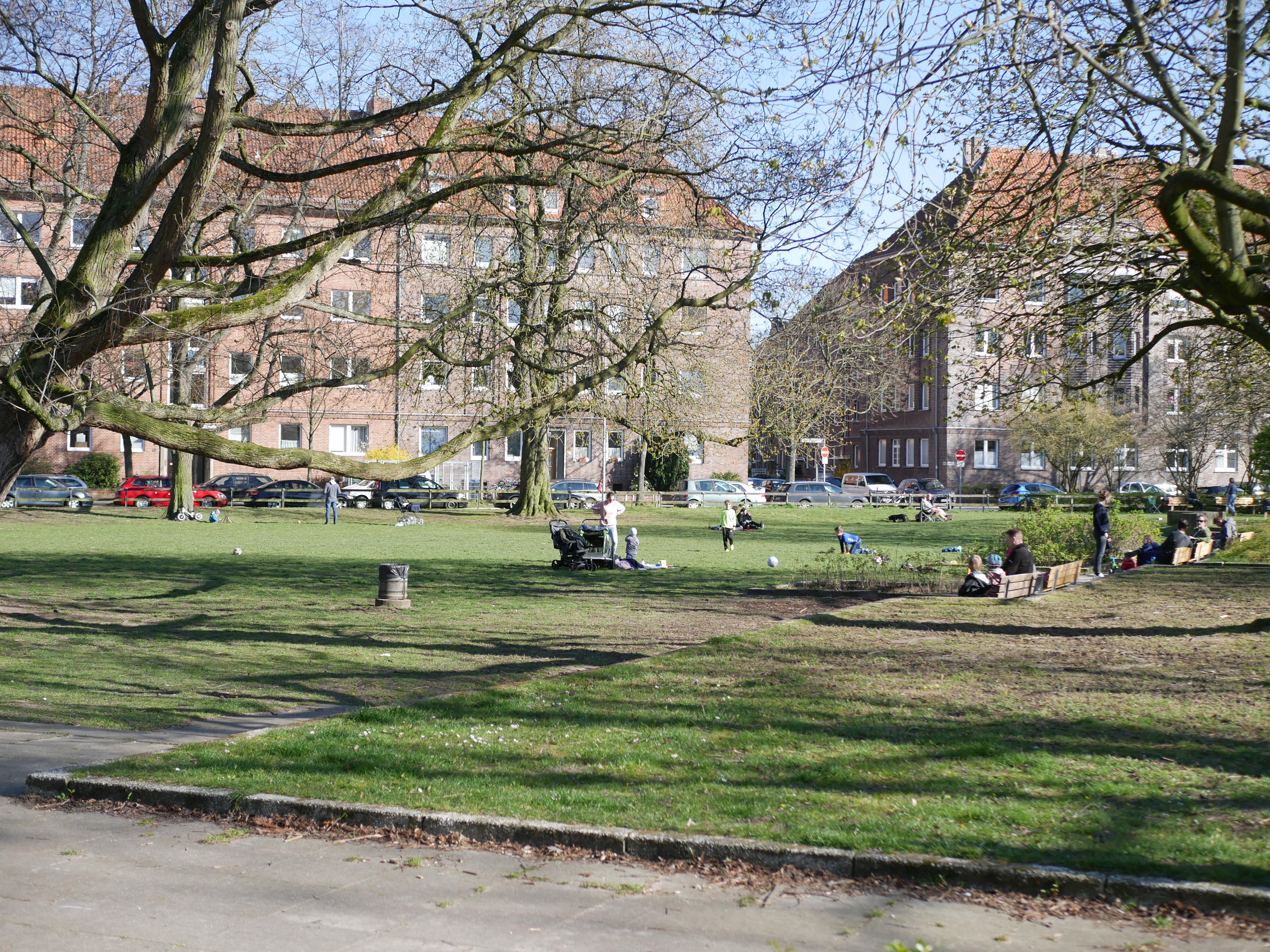 2020-04-04 Bertha-von-Suttner-Platz Hannover Spiel- und Liegewiese